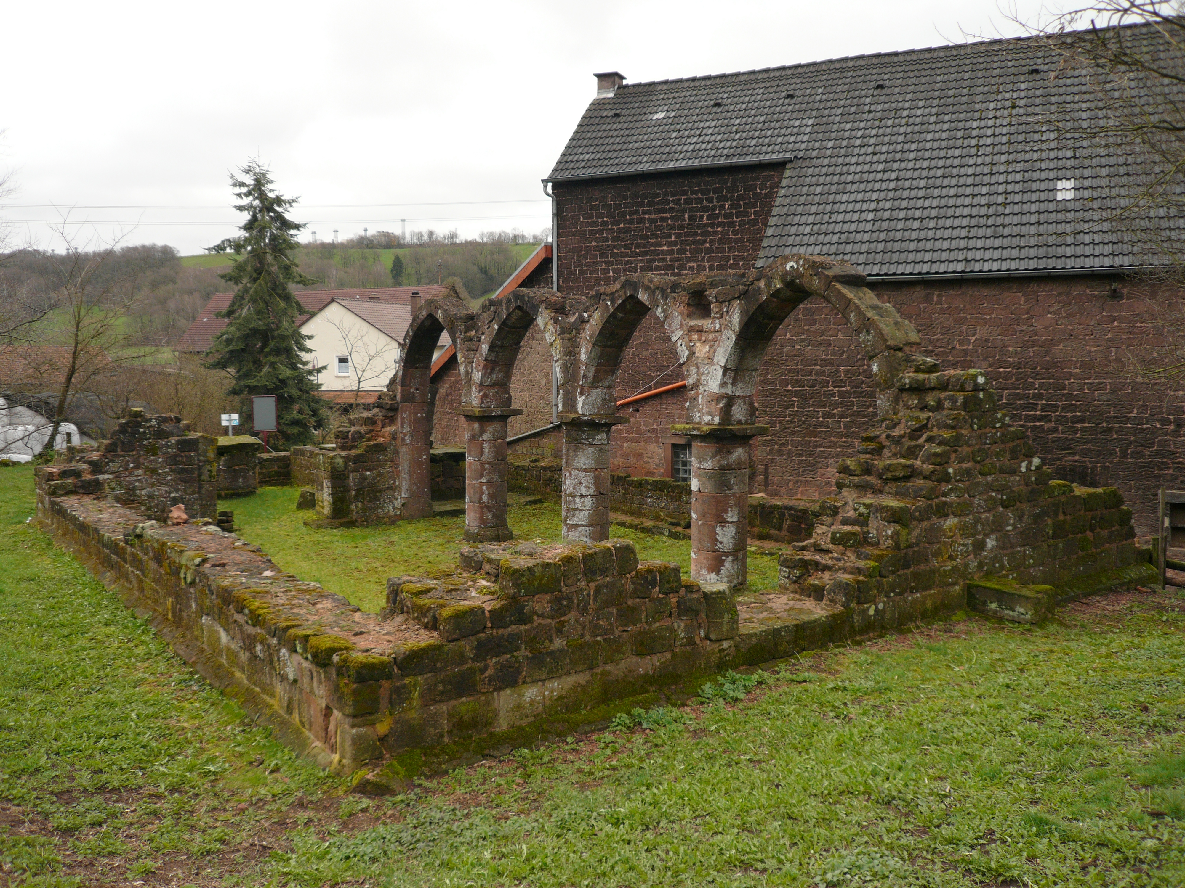 Remains of the medieval Verenakapelle in Mittelbrunn/ Pfalz